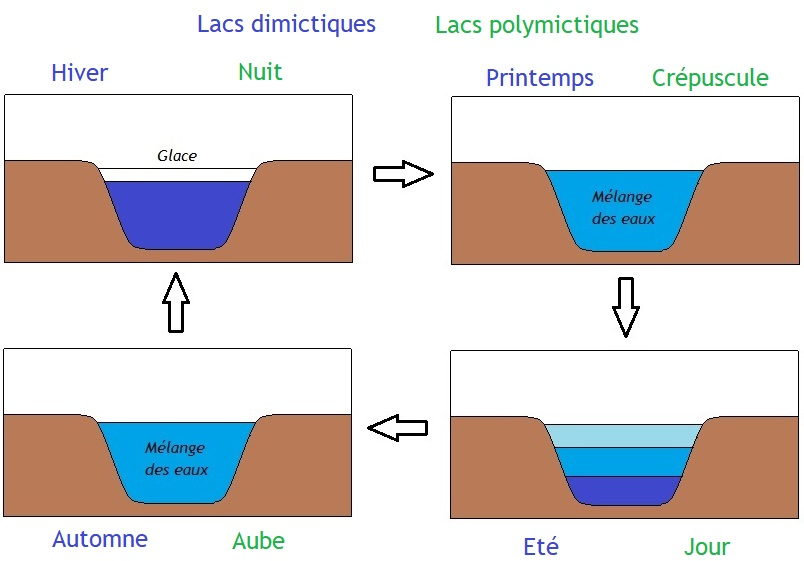 Lac dimictique/polymictique